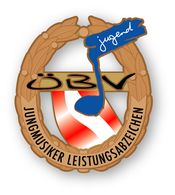 Jungmusikerleistungssabzeichen in Bronze